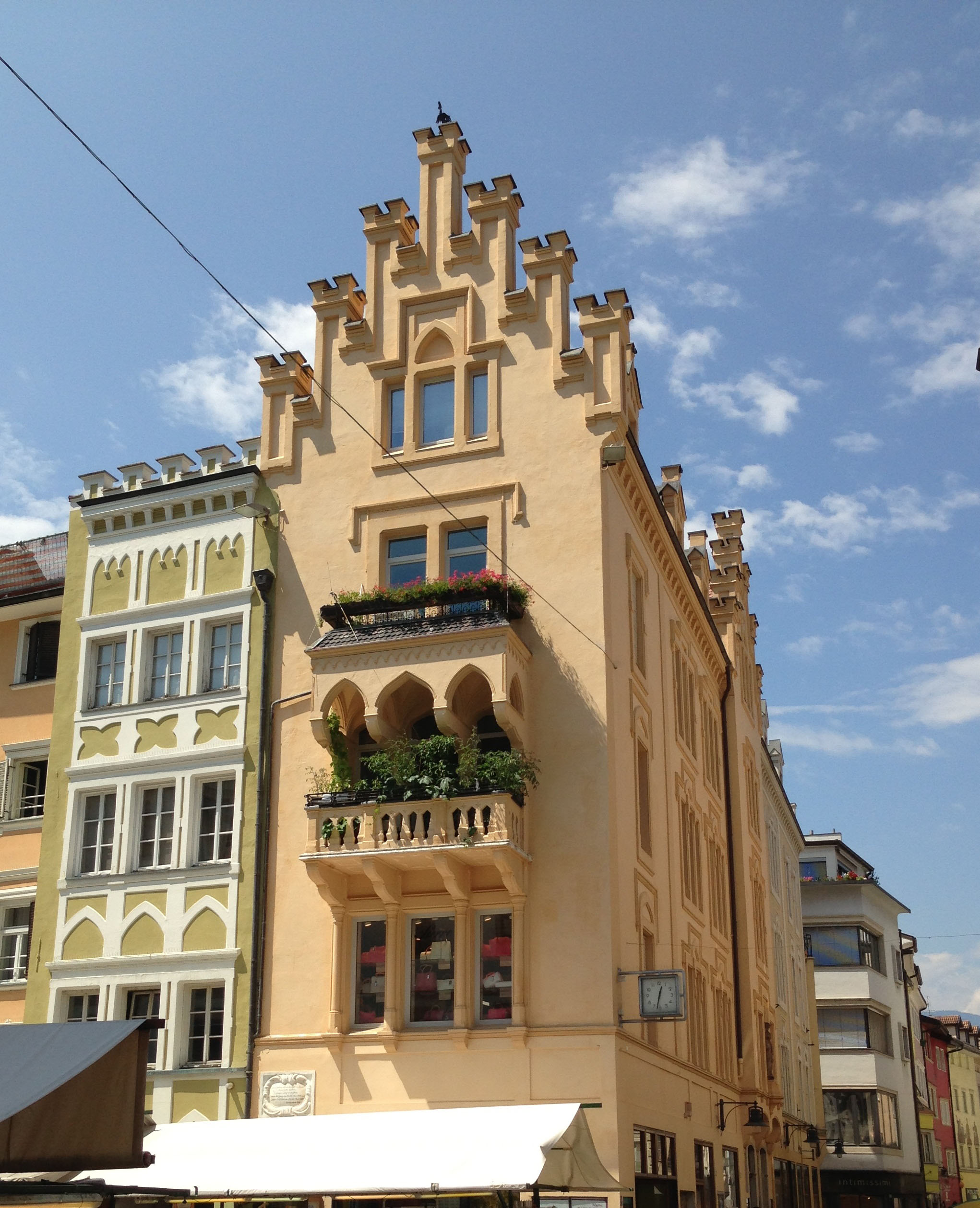 Museumstraße 1-3 am Obstmarkt in Bozen